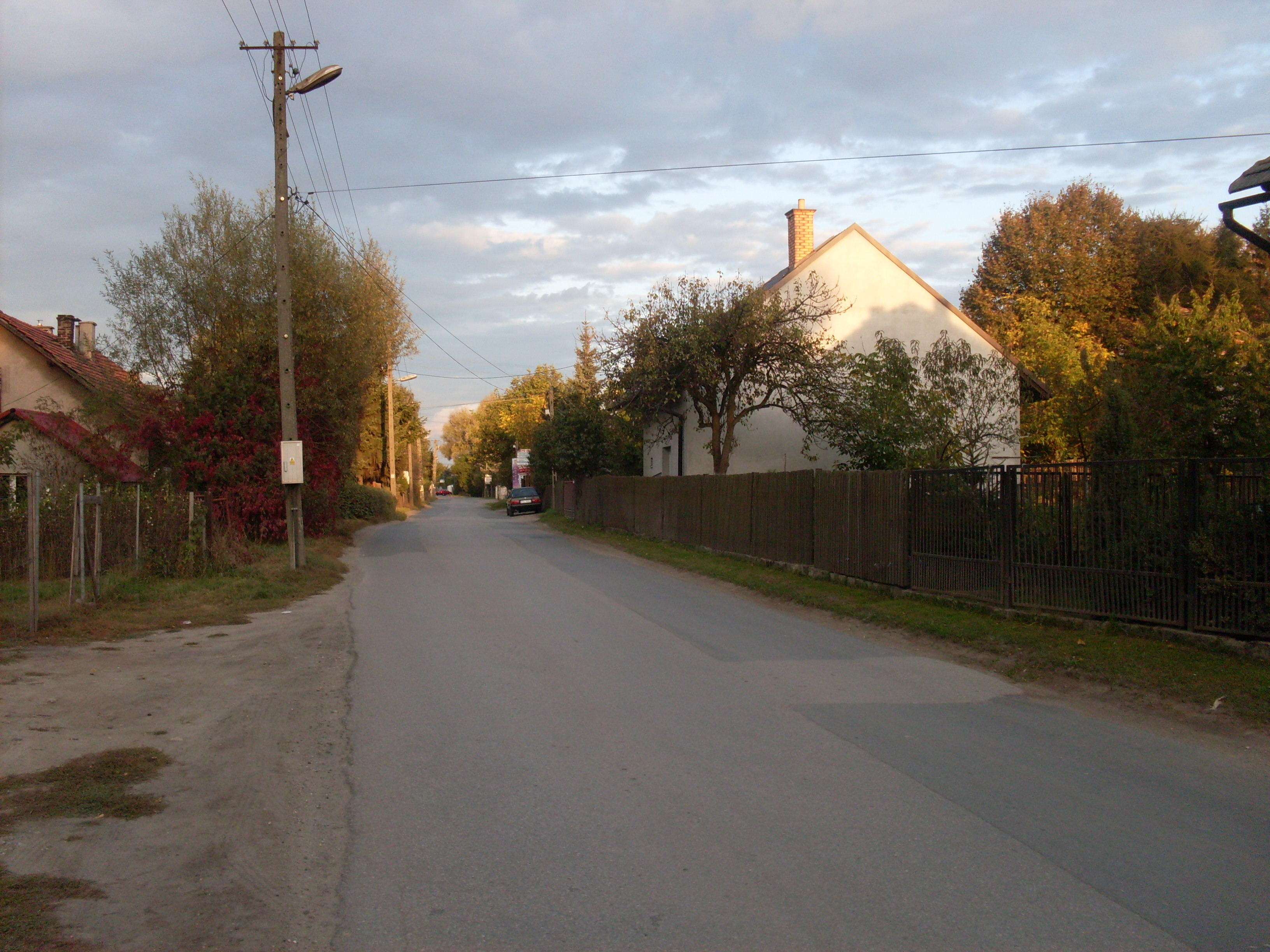 Gwoździec. Widok na część wschodnią - należącą do Nawojowej Góry.